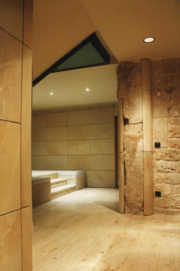 Instytut Polski w Paryżu